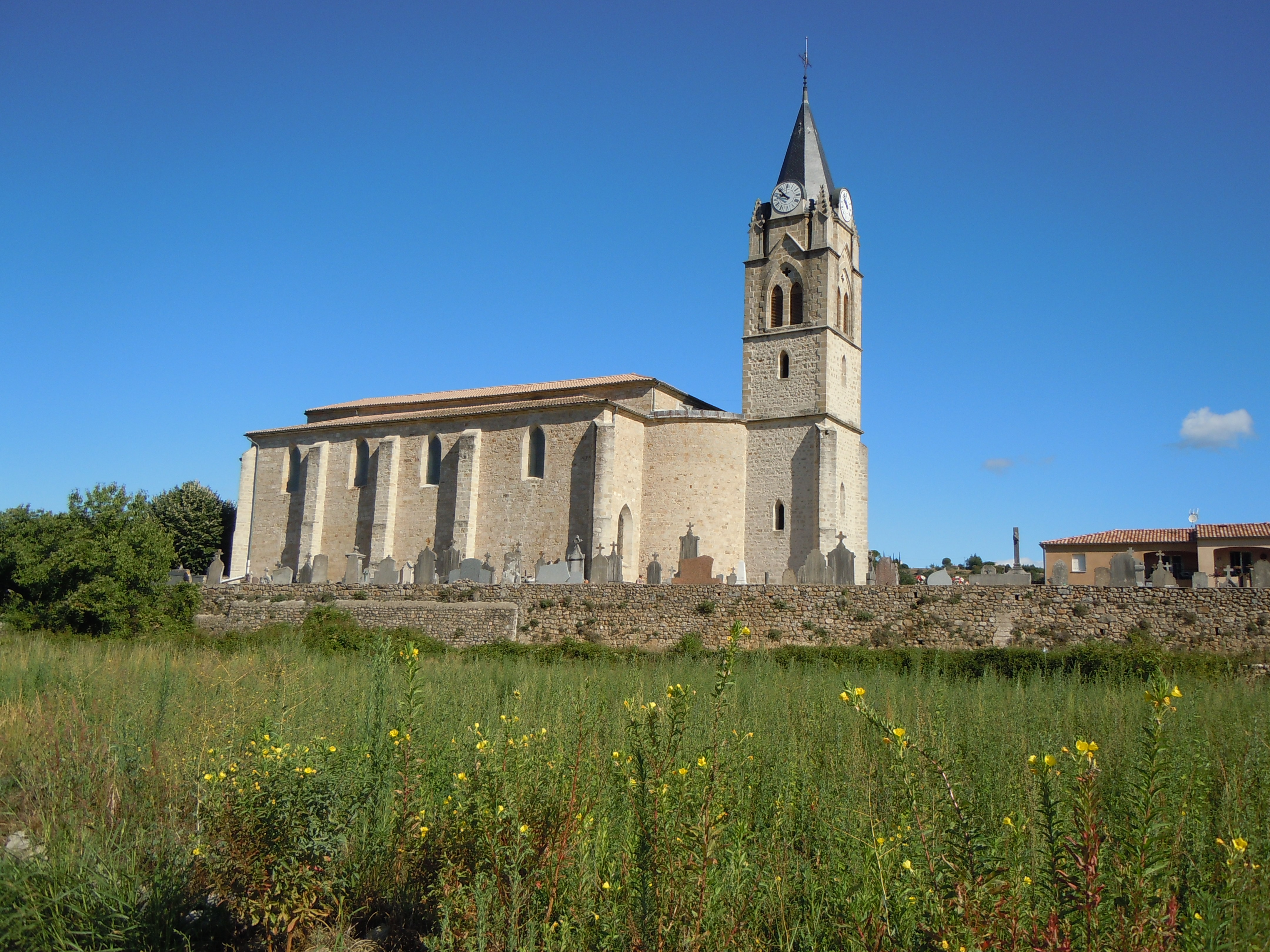 Église Notre-Dame de Rosières - Ardèche